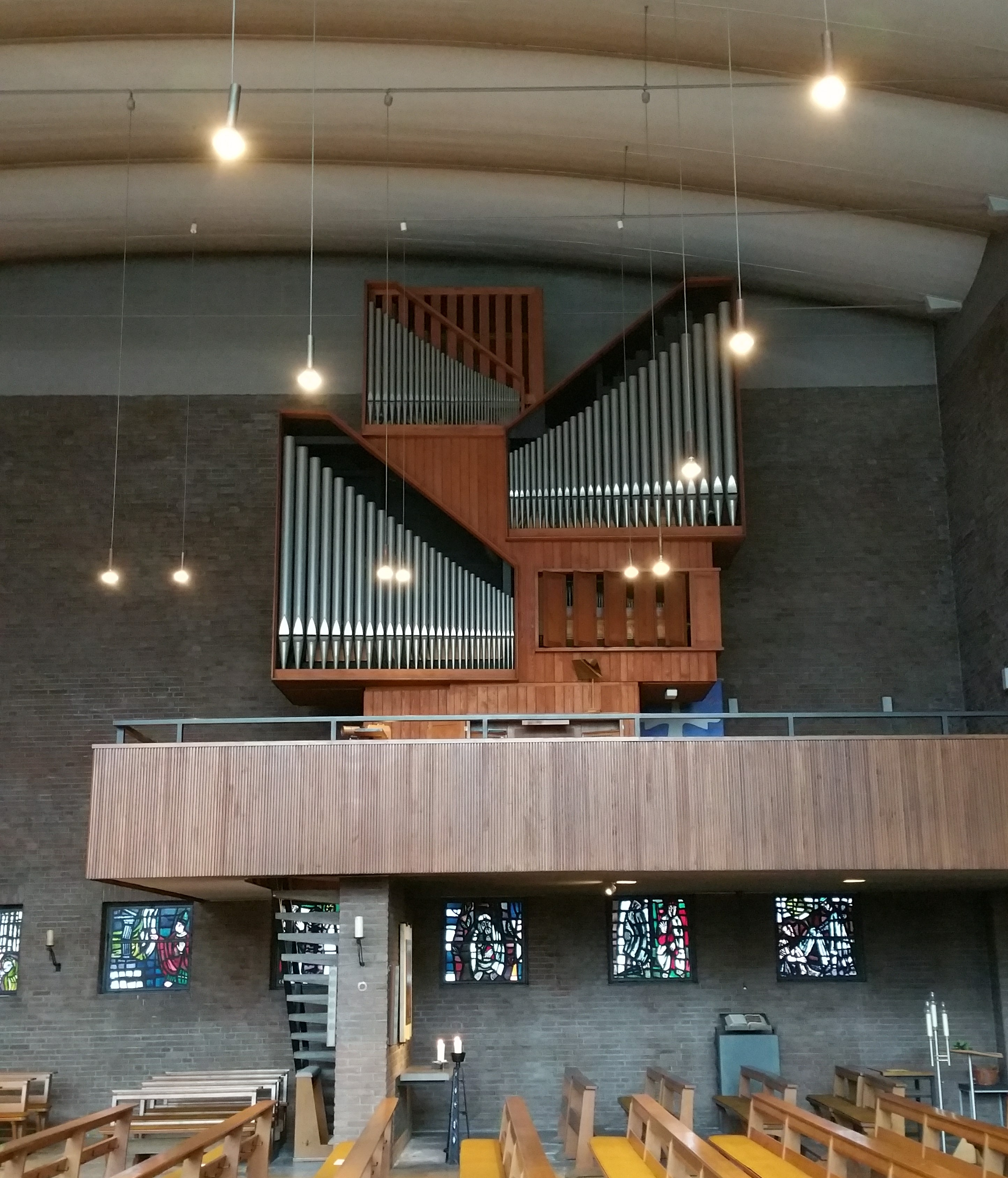 Katholische Kirche St. Martin in Dortmund, Gabelsberger Straße; Innen, Blick auf die Südwand mit der Orgelempore